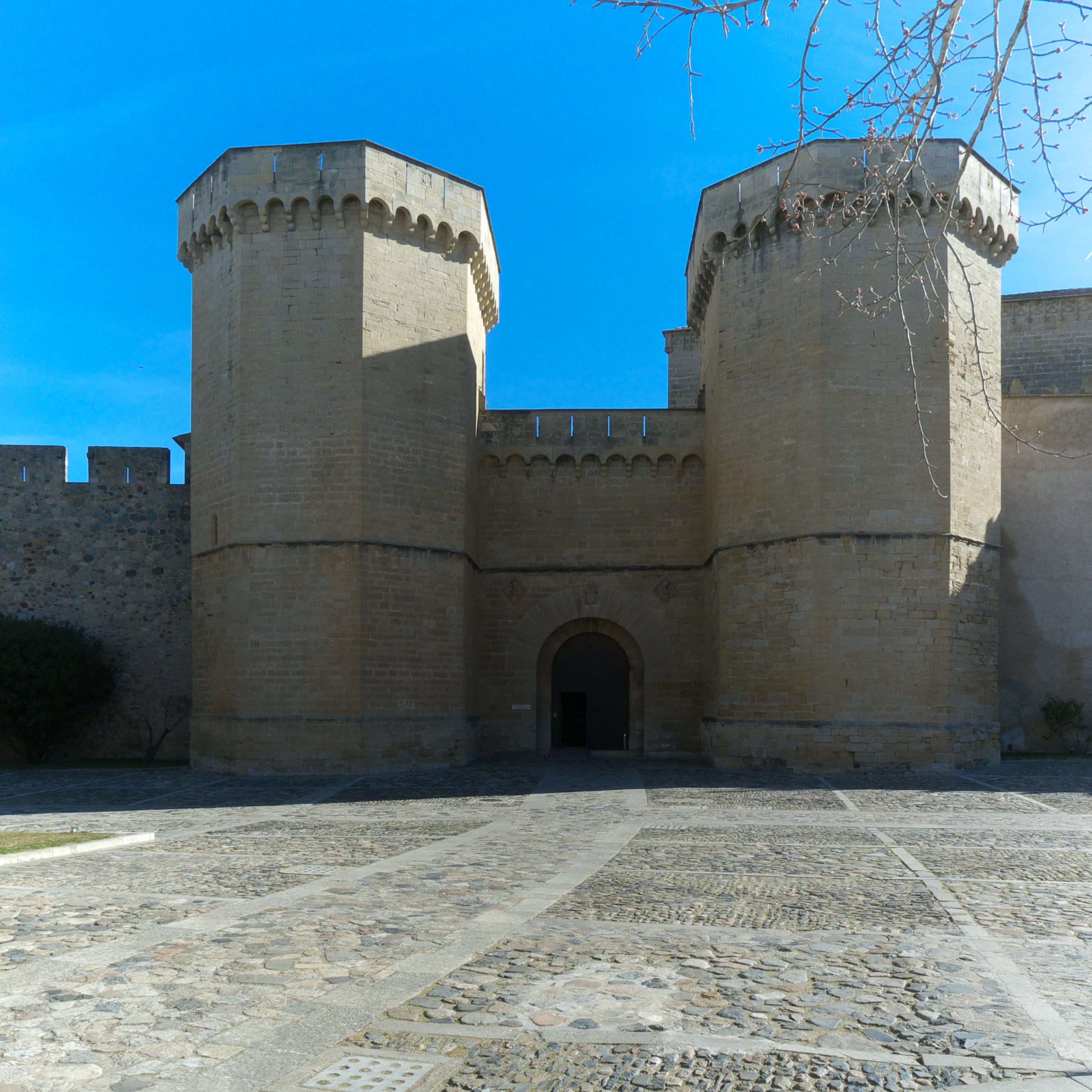 Pedro IV de Aragón, siendo abad Guillermo de Agulló, convierte el monasterio en una fortaleza de 608 metros de murallas, con esta Puerta Real (1379-97).